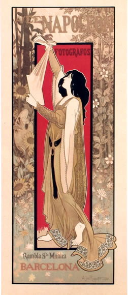 Cartell de publicitat dels fotògrafs Napoleón (Barcelona 1851-1968), realitzat per Alexander de Riquer.